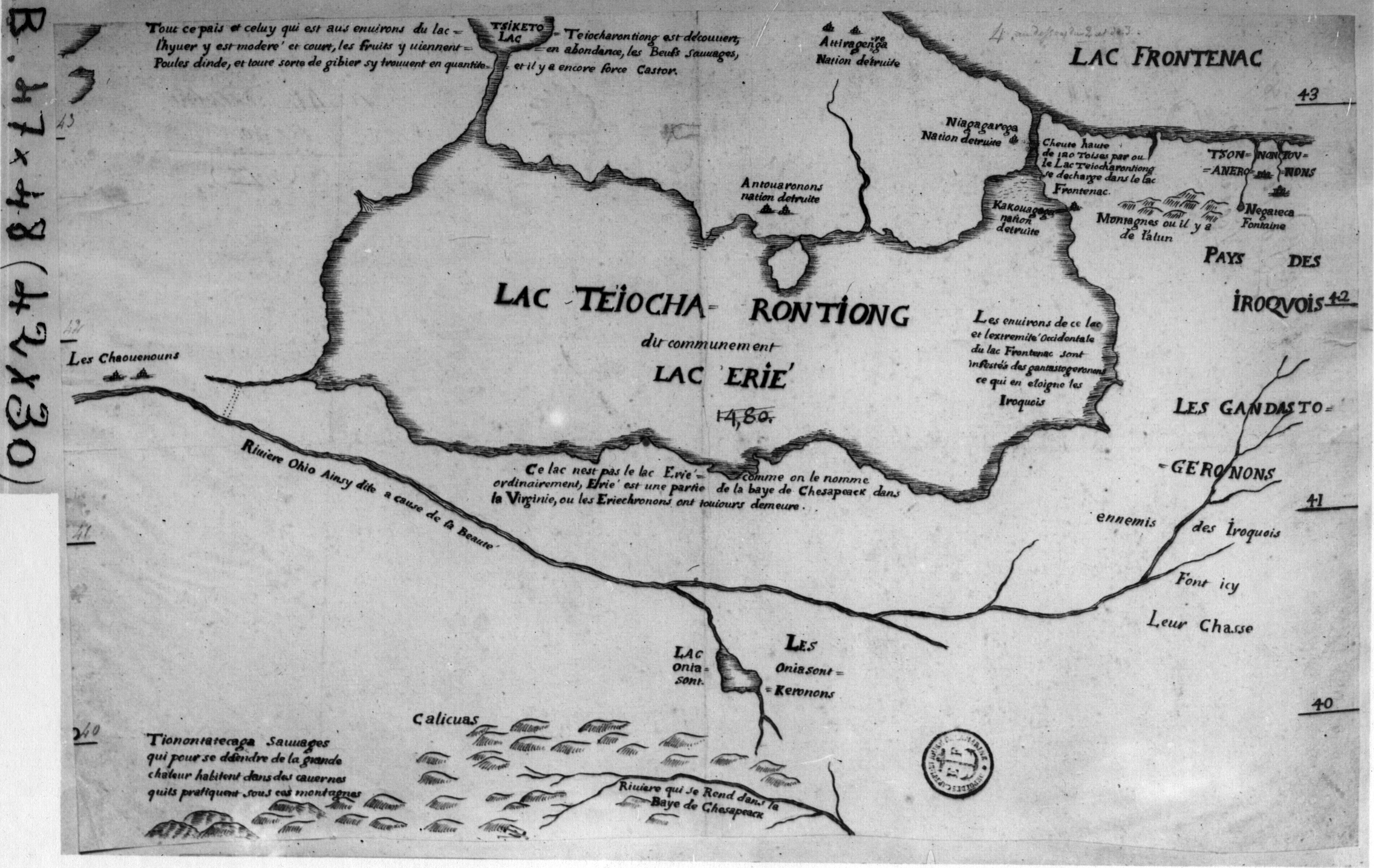 Lac Teiocharontiong, dit communement Lac Érié. On y voit aussi l'emplacement de la nation détruite Niagagarega; chute haute de 120 toises par où le lac Teiocharontiong se décharge dans le lac Frontenac.